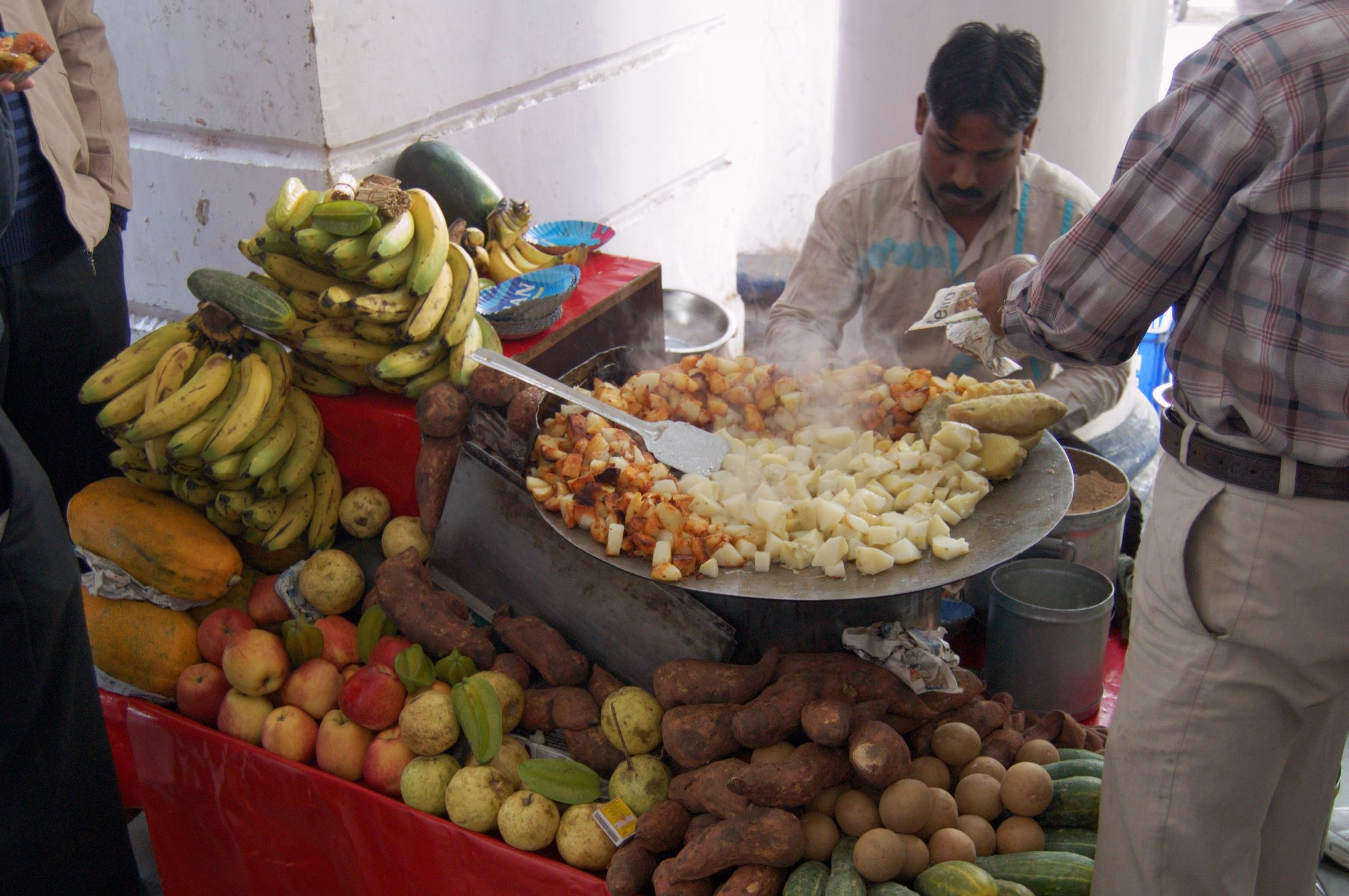 still more street food